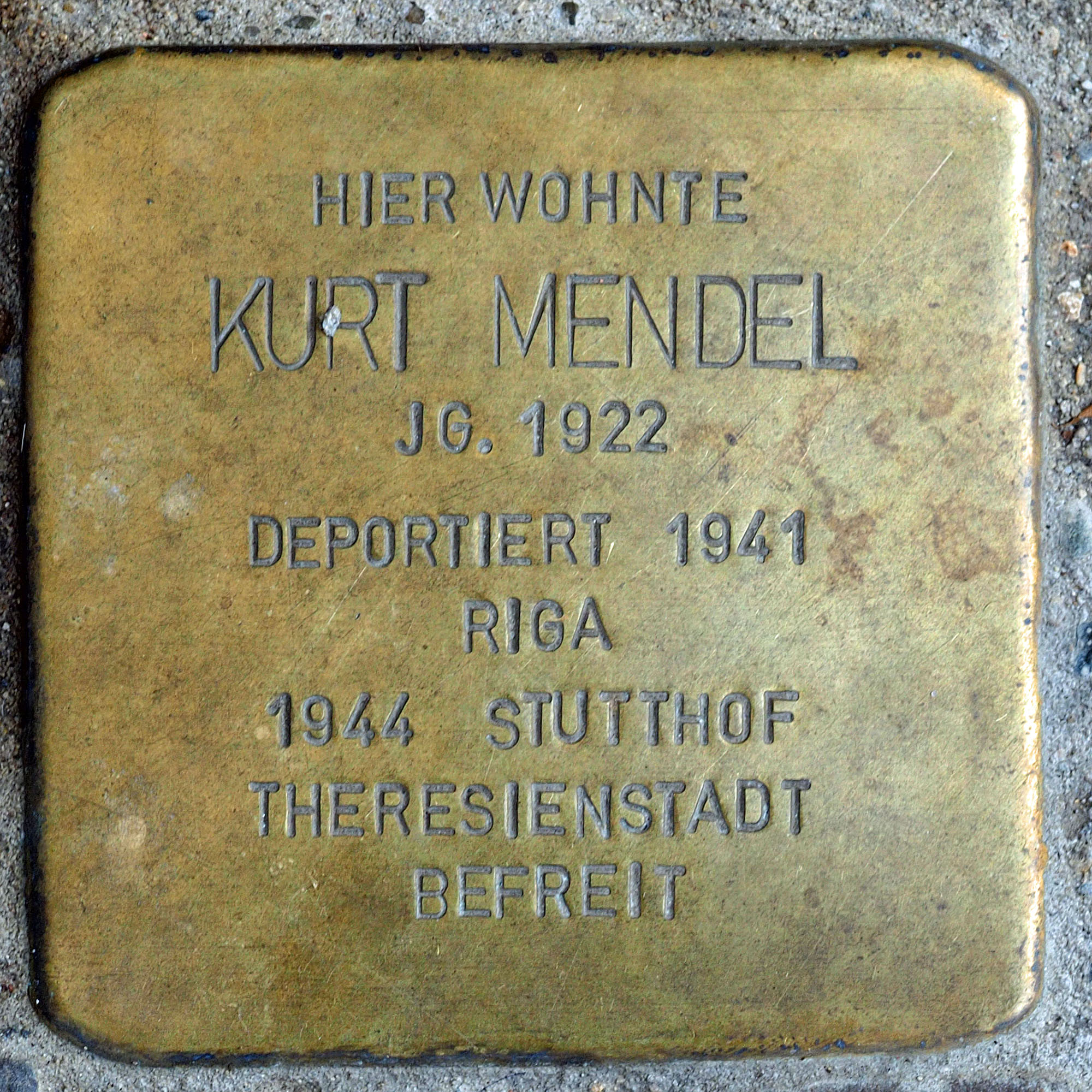 Stolpersteine in Kempen: Kurt Mendel, Von-Loe-Straße 14